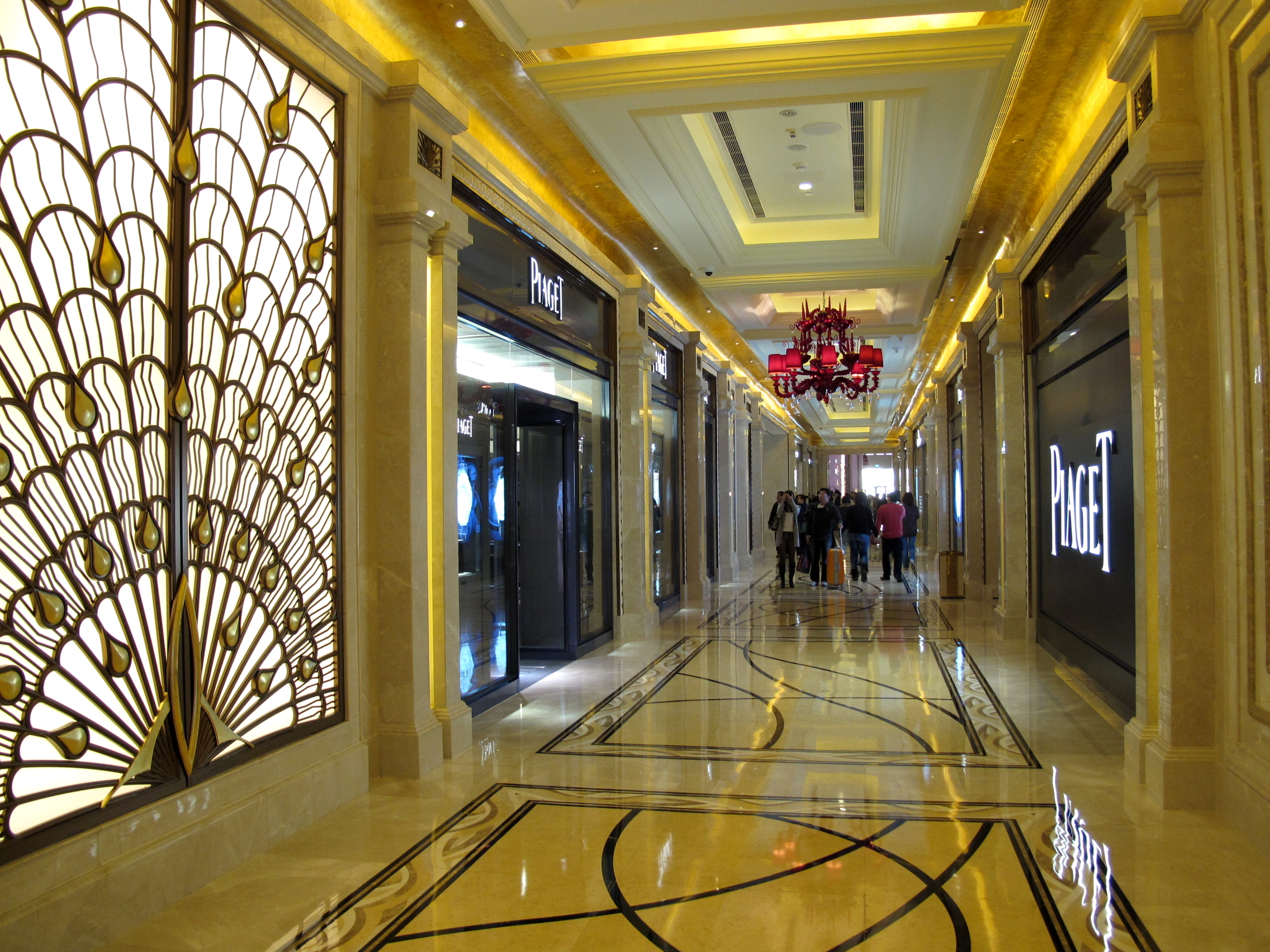 Galaxy Macau West Promenade 澳門銀河 購物大道西